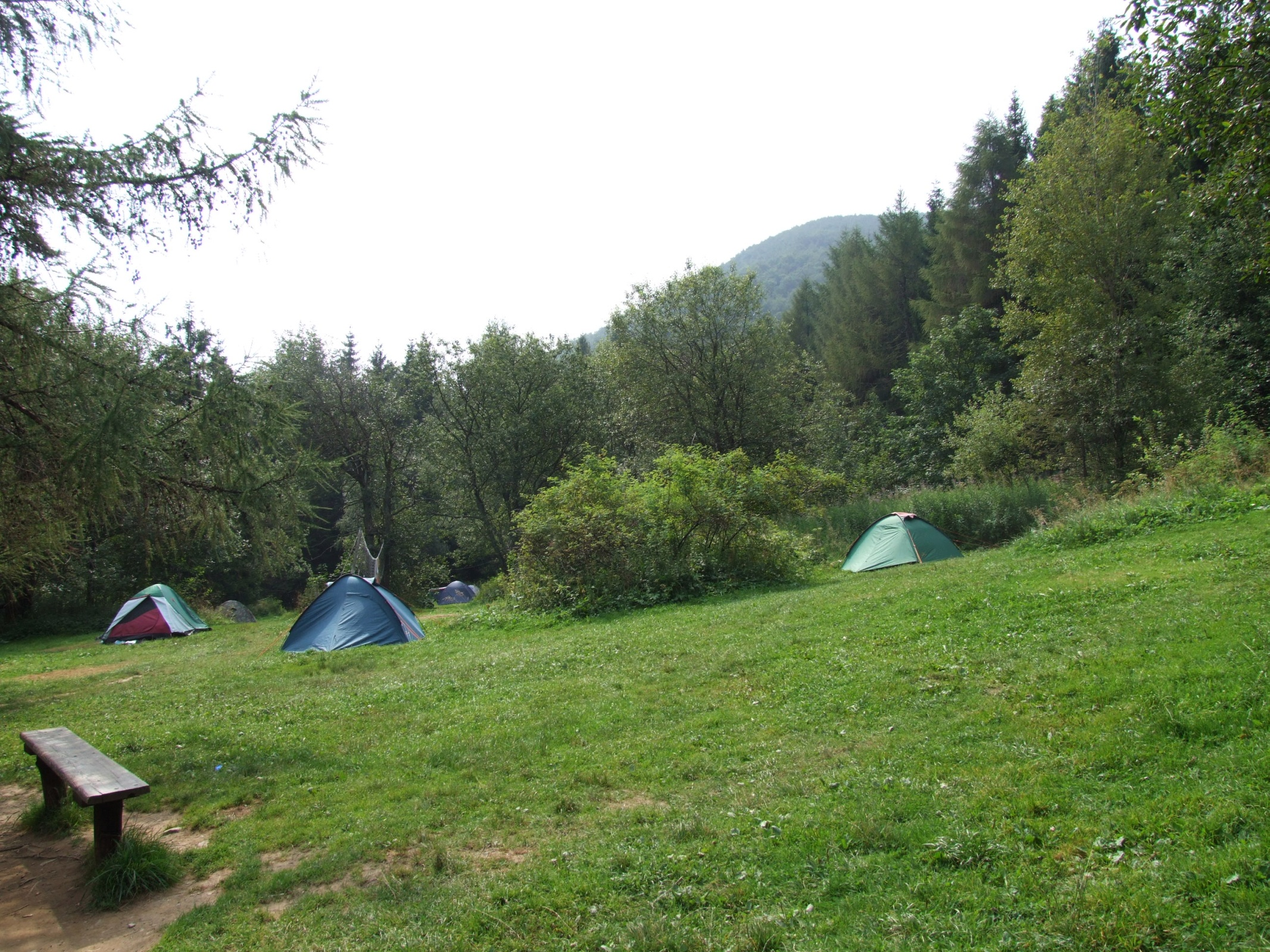 Pole namiotowe przy Bacówce Pod Małą Rawką w Bieszczadach